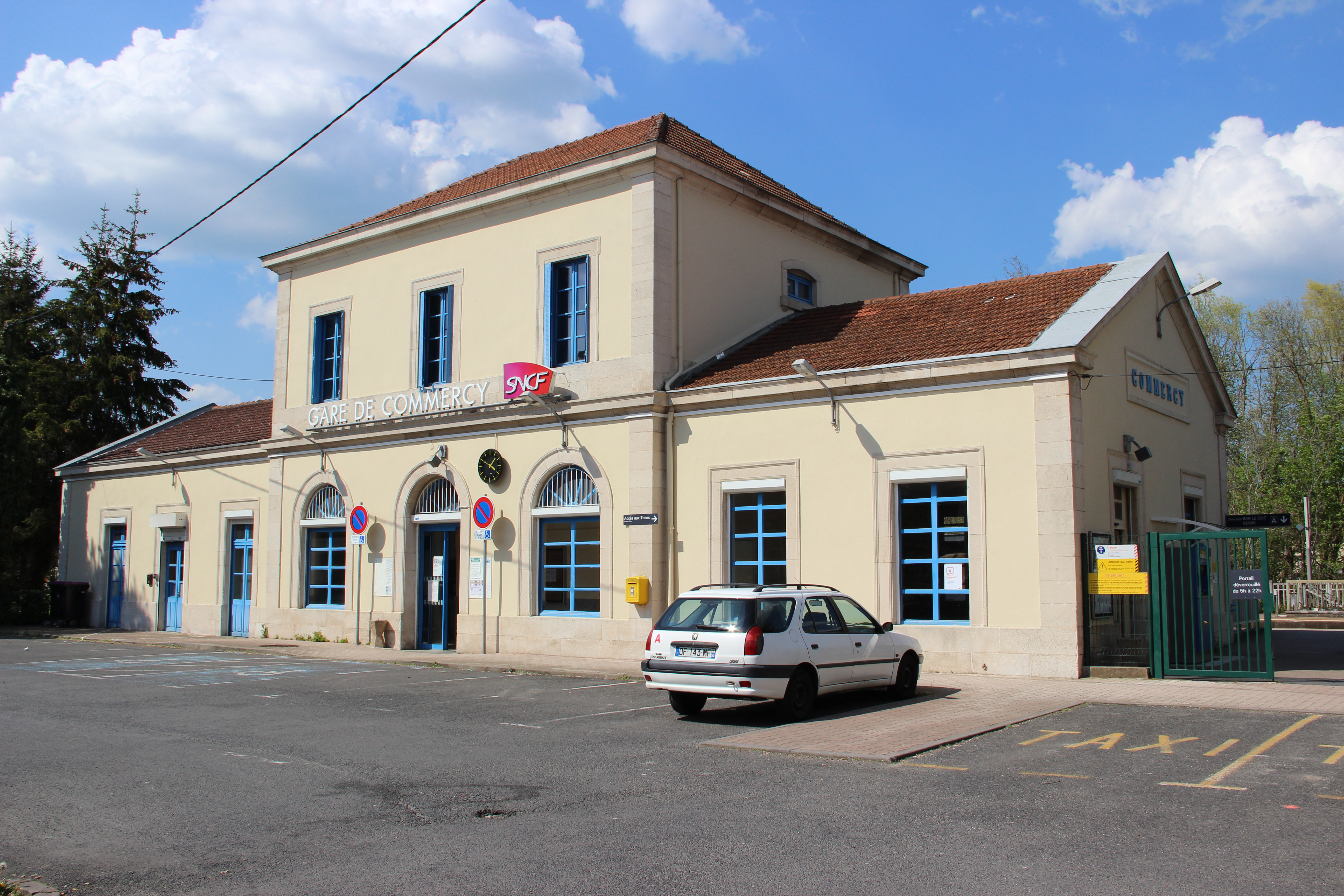 Façade extérieure de la gare